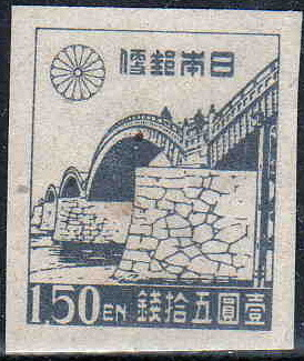 錦帯橋を描く1円50銭切手。1946年発行の普通切手。